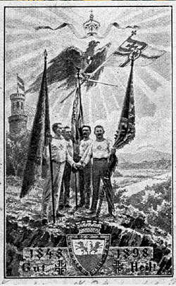 Gedenkblatt zum 50-jährigen Jubiläum der Turngemeinde Witten